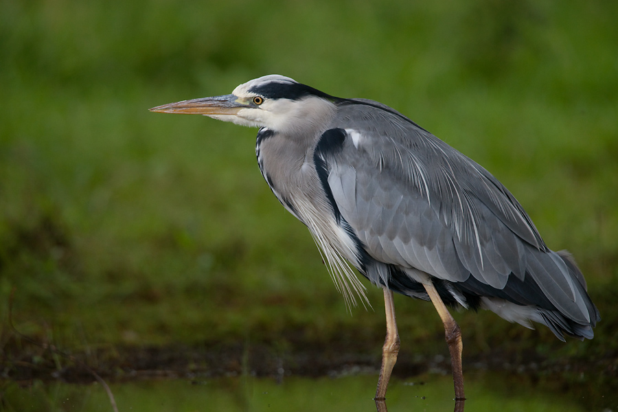 Ardea cinerea